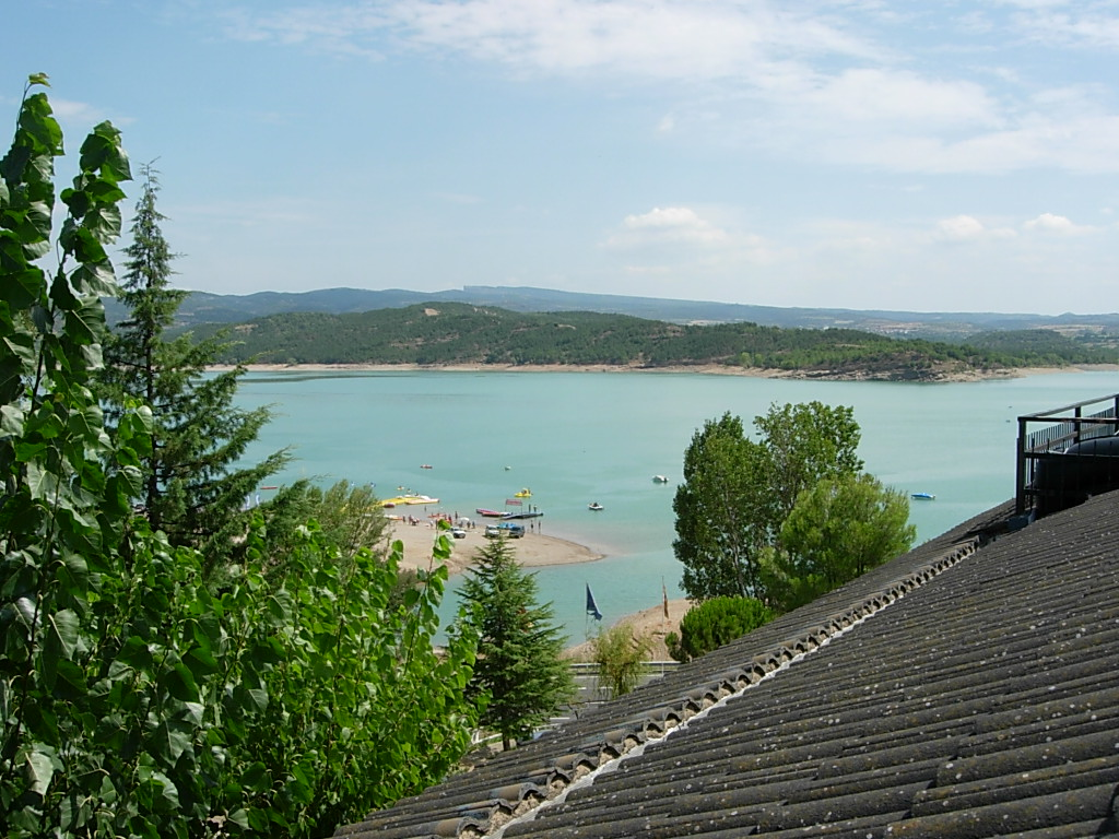 Embalse de Joaquín Costa (Barasona) en La Puebla de Castro